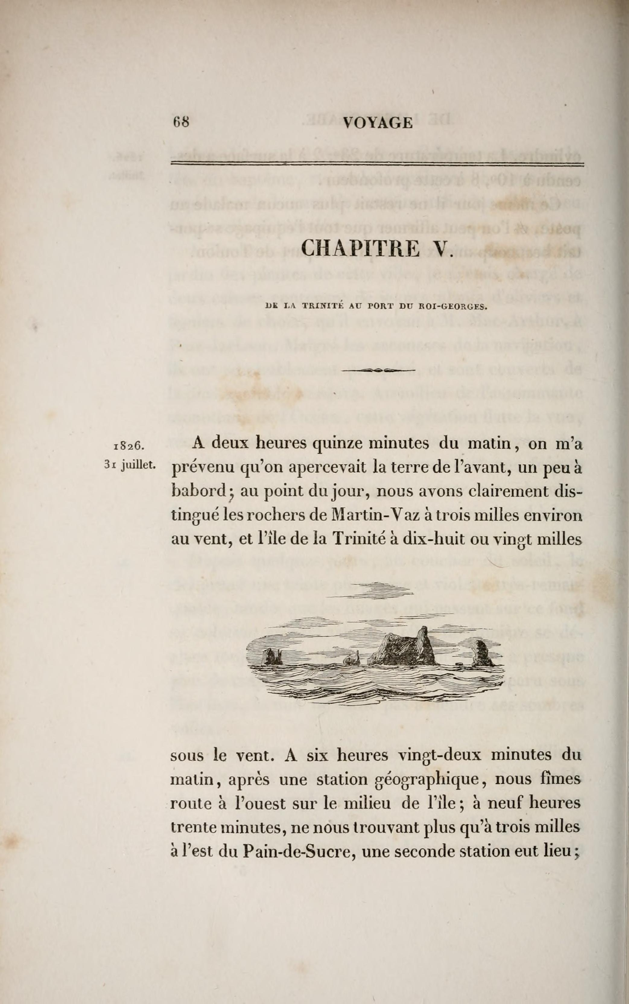 Voyage de la corvette l'Astrolabe : exécuté par ordre du roi, pendant les années 1826-1827-1828-1829 / sous le commandement de J. Dumont d'Urville.